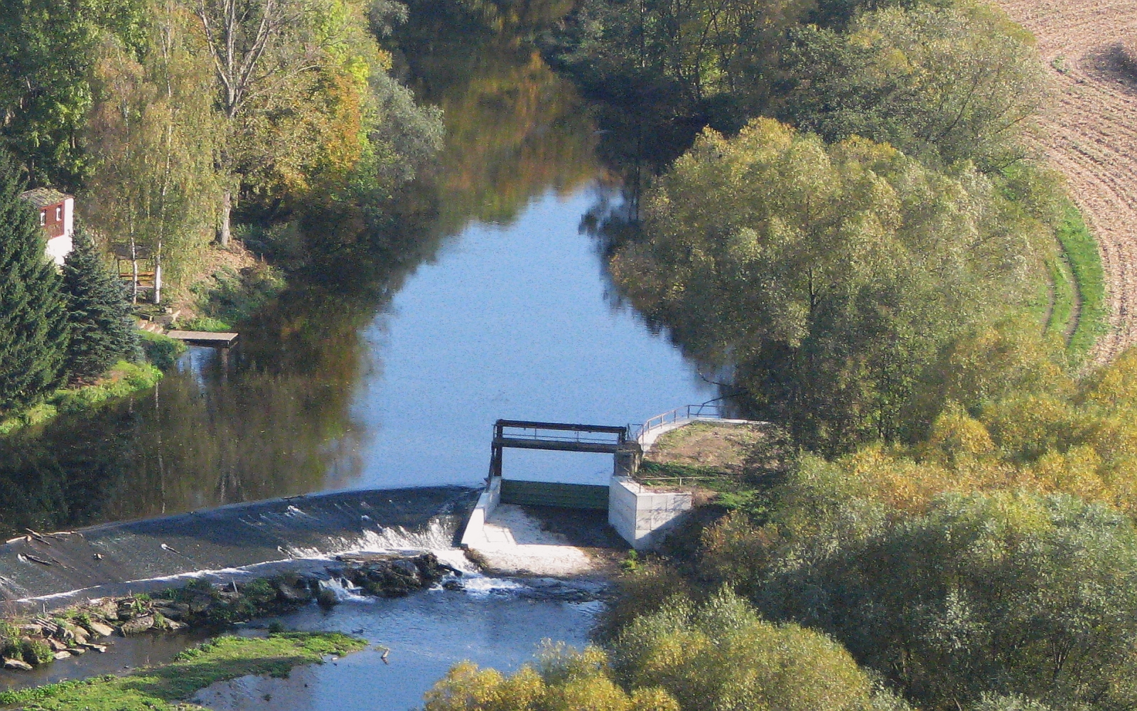 Dornburg Wehr an der Saale Foto 2008 Wolfgang Pehlemann Wiesbaden IMG_0200.jpg